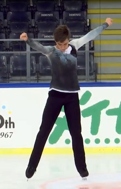 Basar Oktar Salzburg JGP